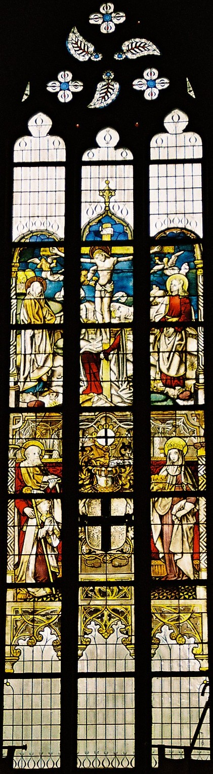 Bödingen, Stadt Hennef (Sieg), Wallfahrtskirche, Chorfenster von 1508